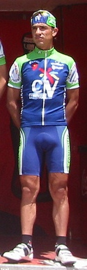 Comunidad Valenciana, Euskal Bizikleta 2005 Eladio Jiménez